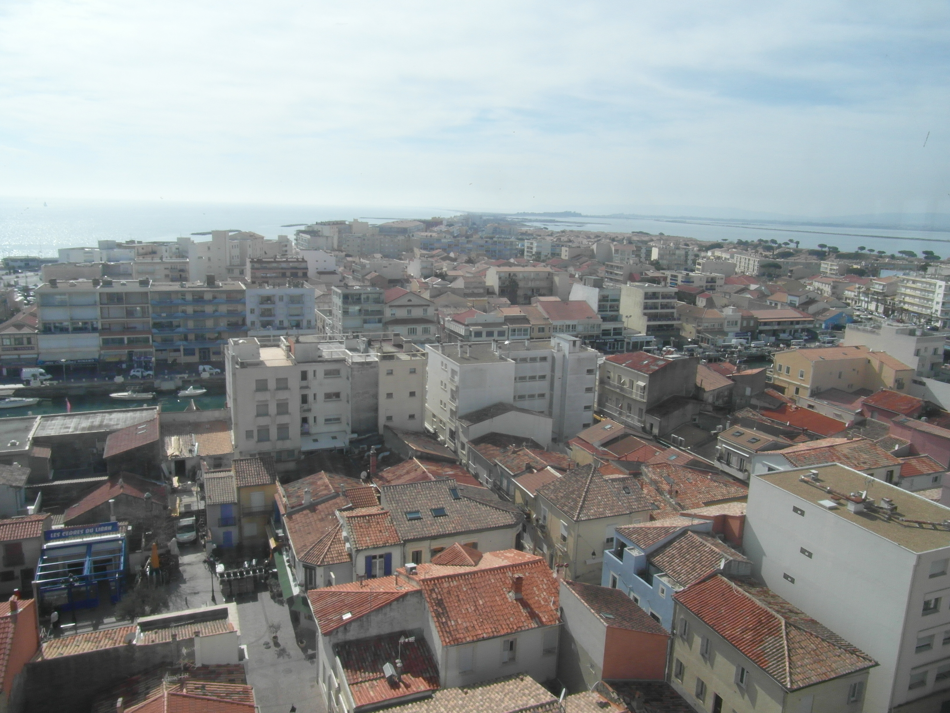 Partie est de Palavas entre l'étang du Grec et le golfe du Lion